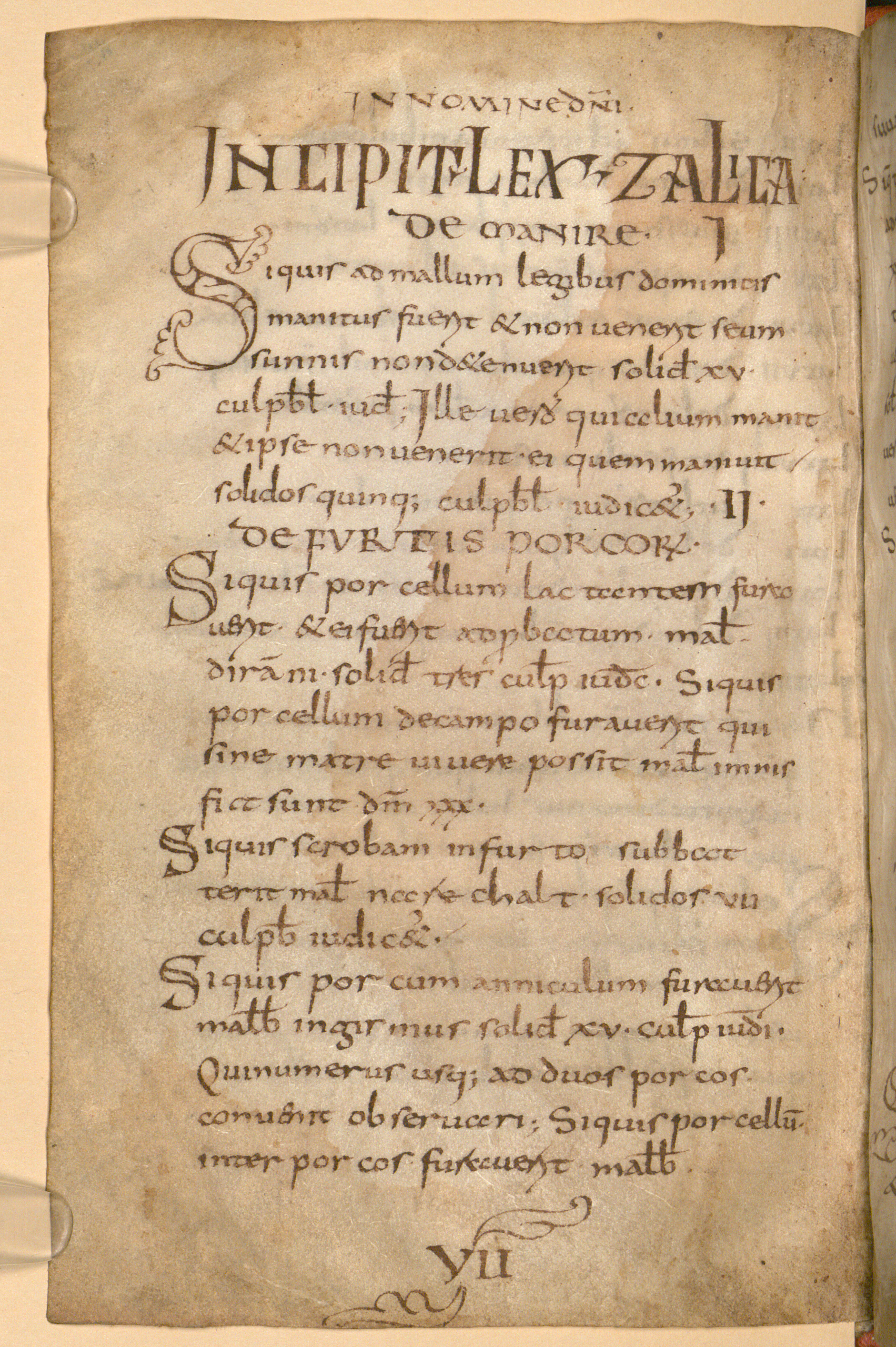 Lex Salica